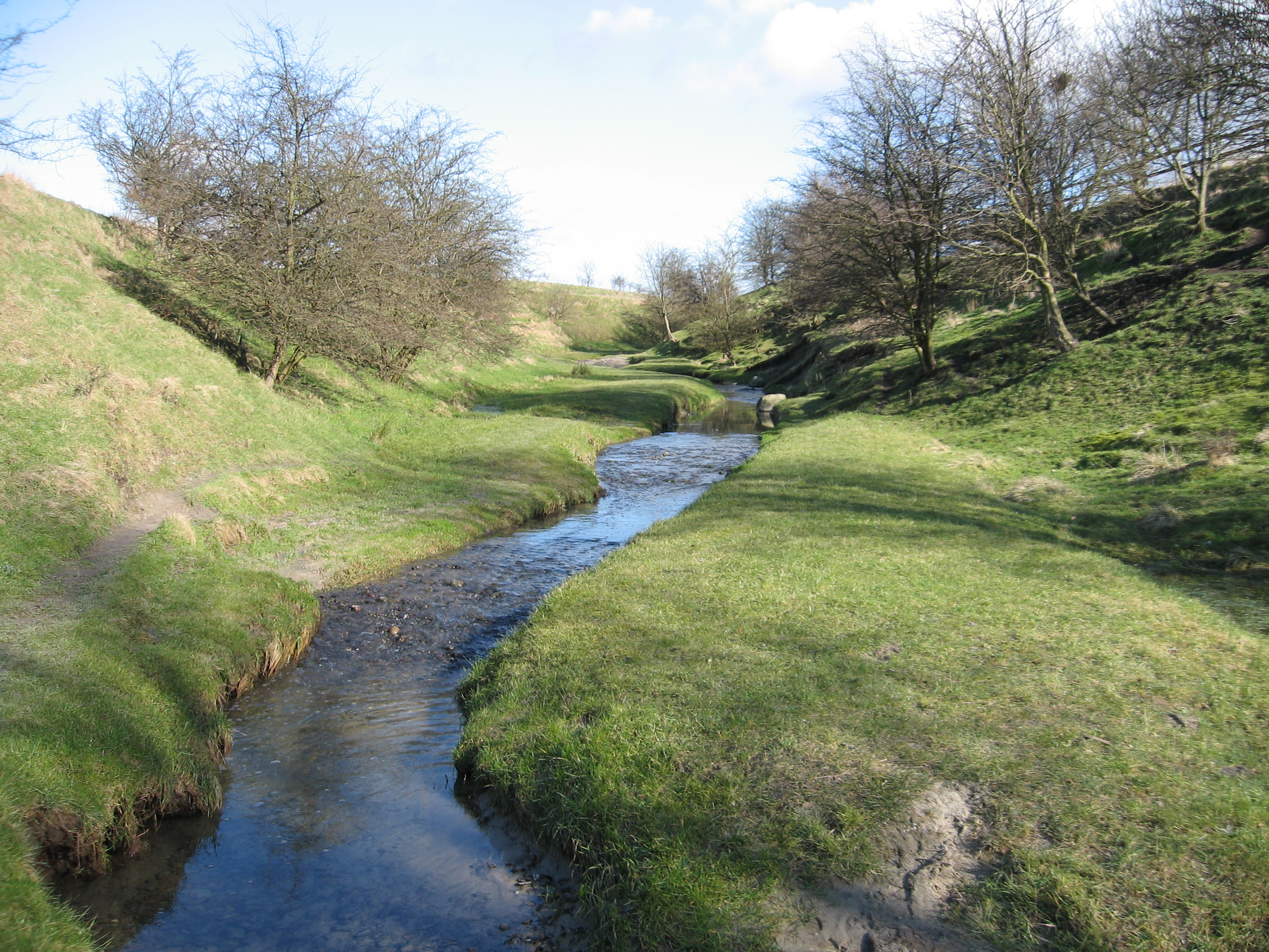 Rinnebäcken i Lund